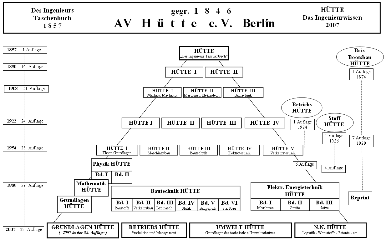 History/Stammbaum der HÜTTE-Ingenieurbücher von 1857-2007